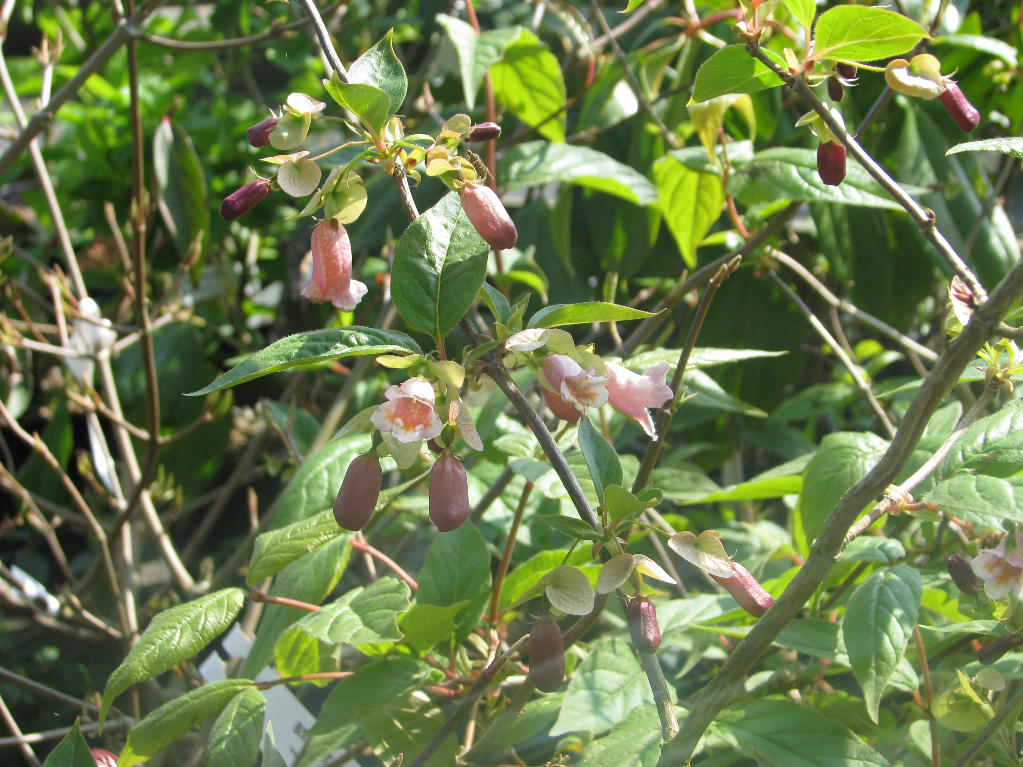 Dipelta ventricosa